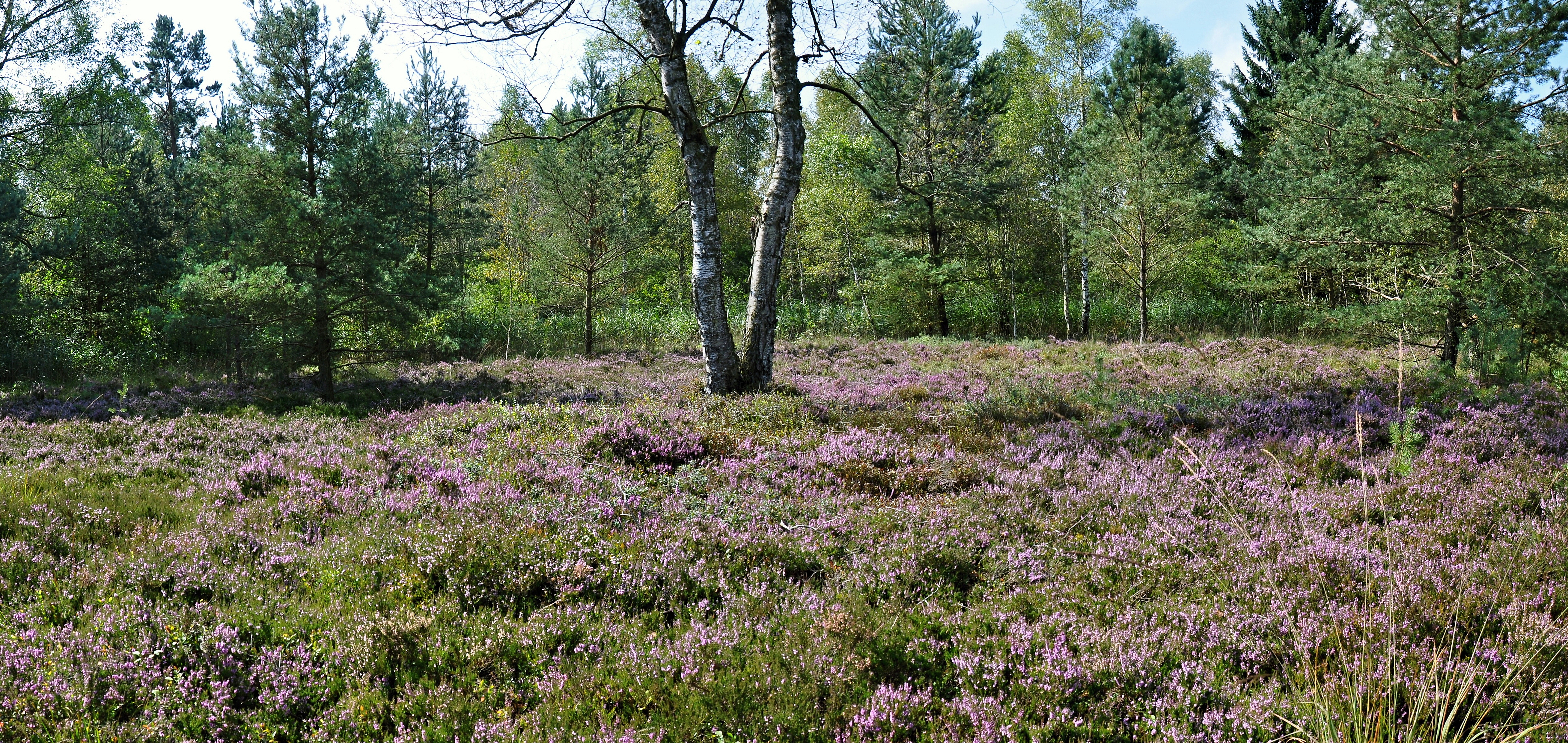 Blühende Besenheide (Calluna vulgaris) und Glockenheide (Erica tetralix) im Hochmoor mit Birke, Waldkiefer, Spirke und Fichte.